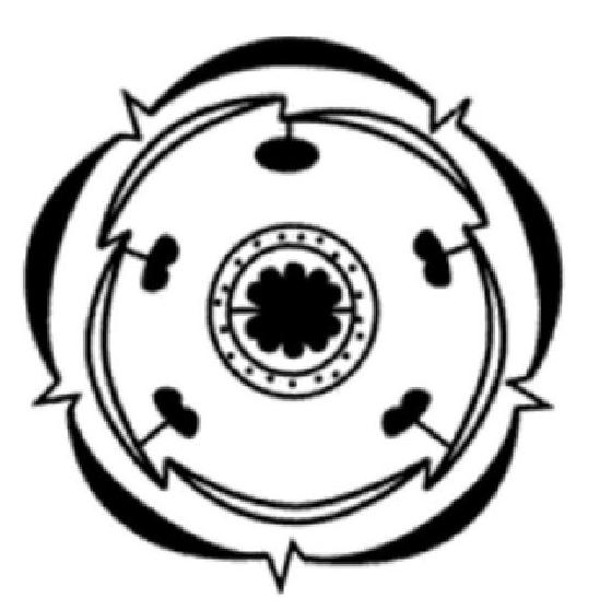 Scruphularia floral diagram